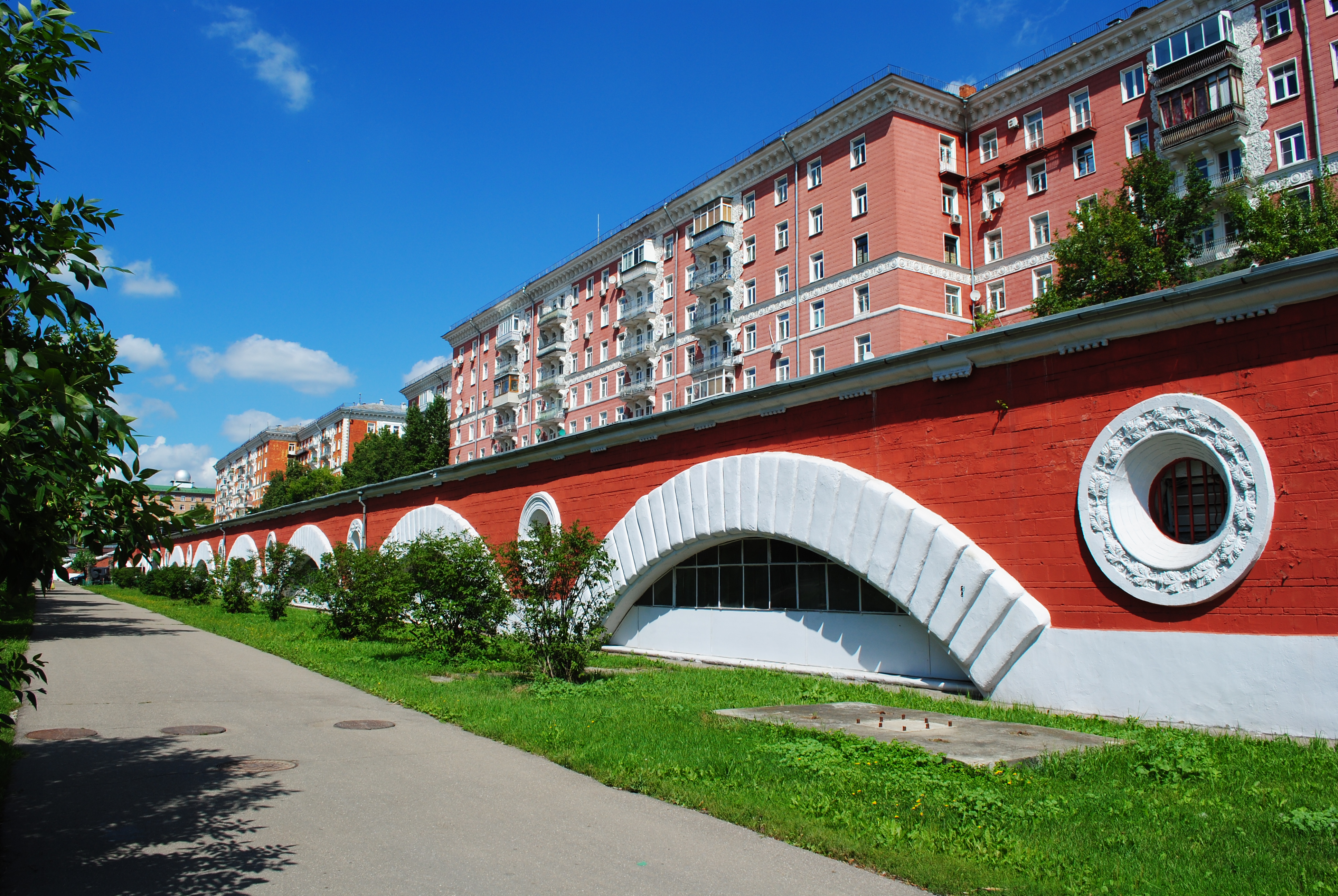 «Красные дома» (гараж и д. 4)